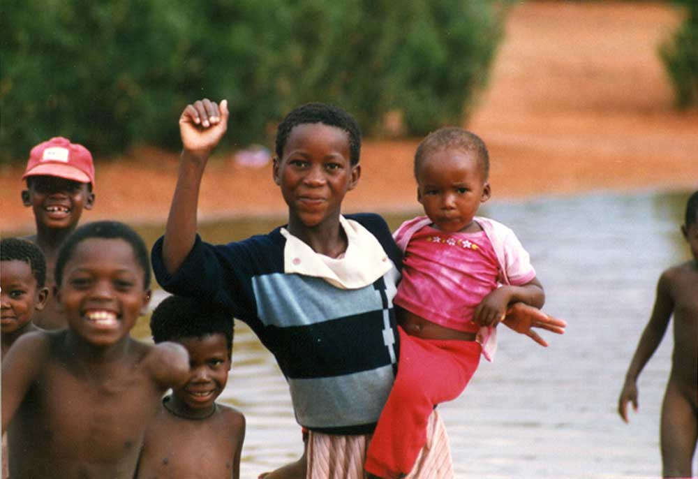 Taken by user:Guinnog